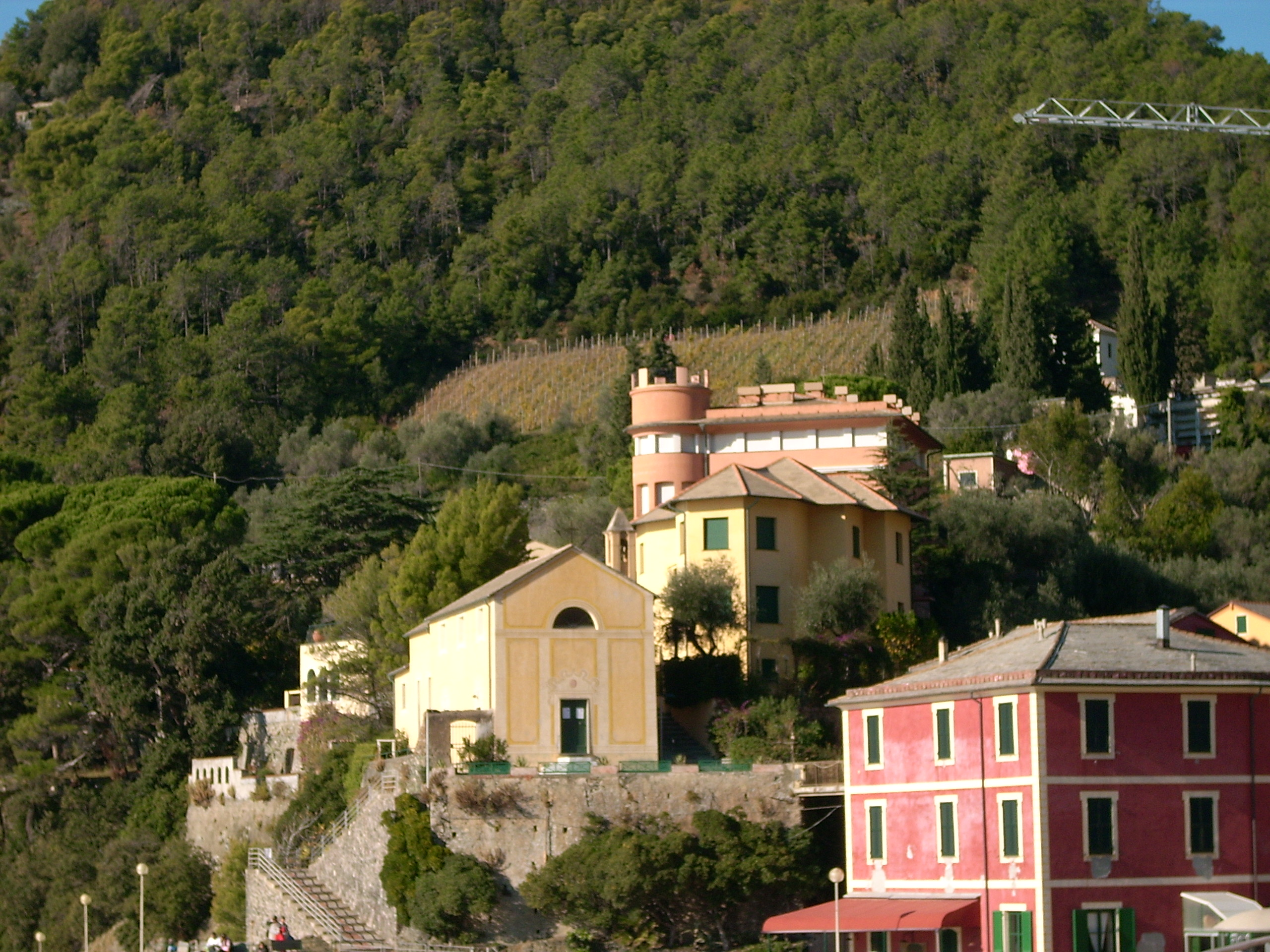 Bonassola, Liguria, Italia